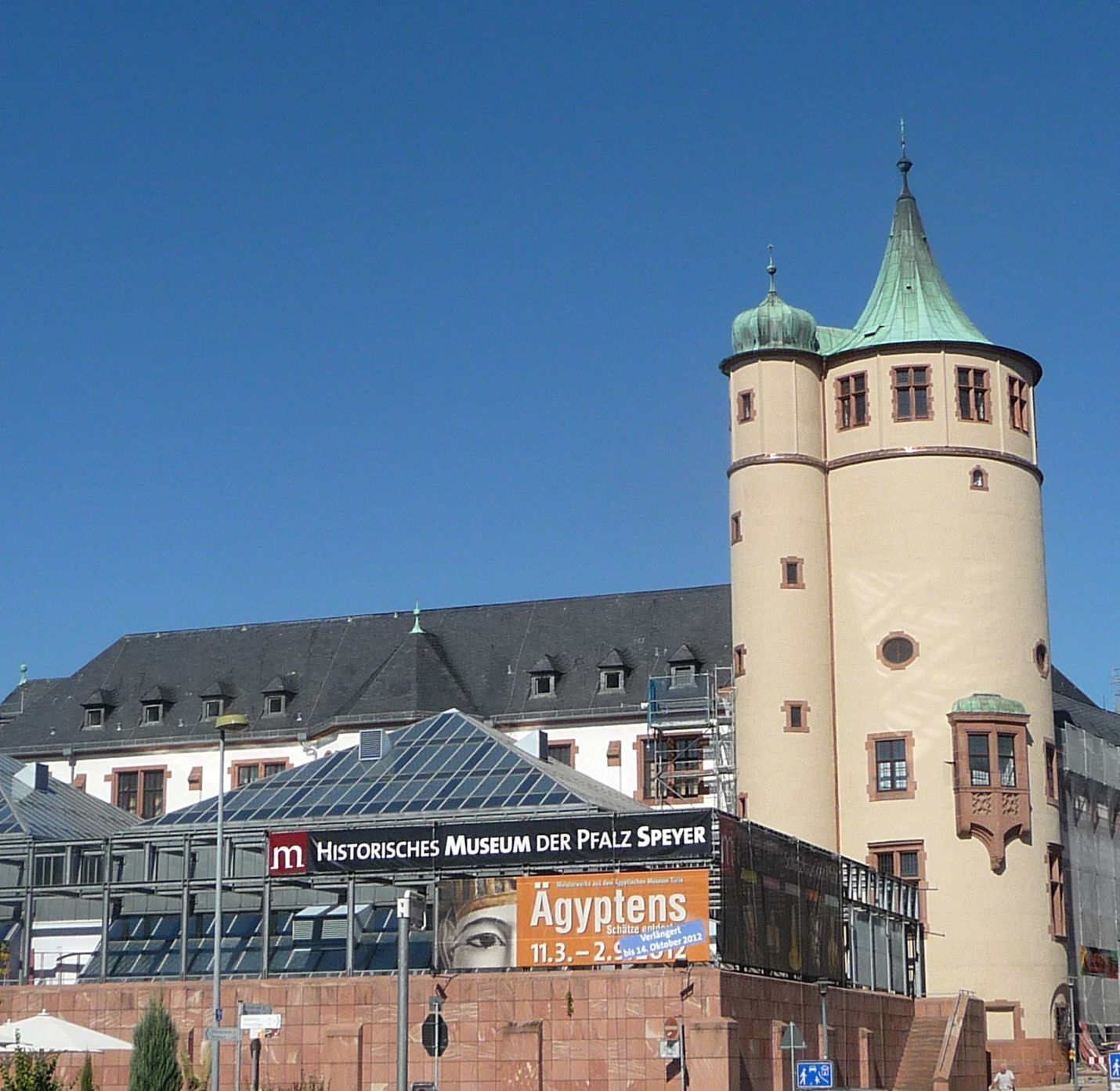 Historisches Museum der Pfalz